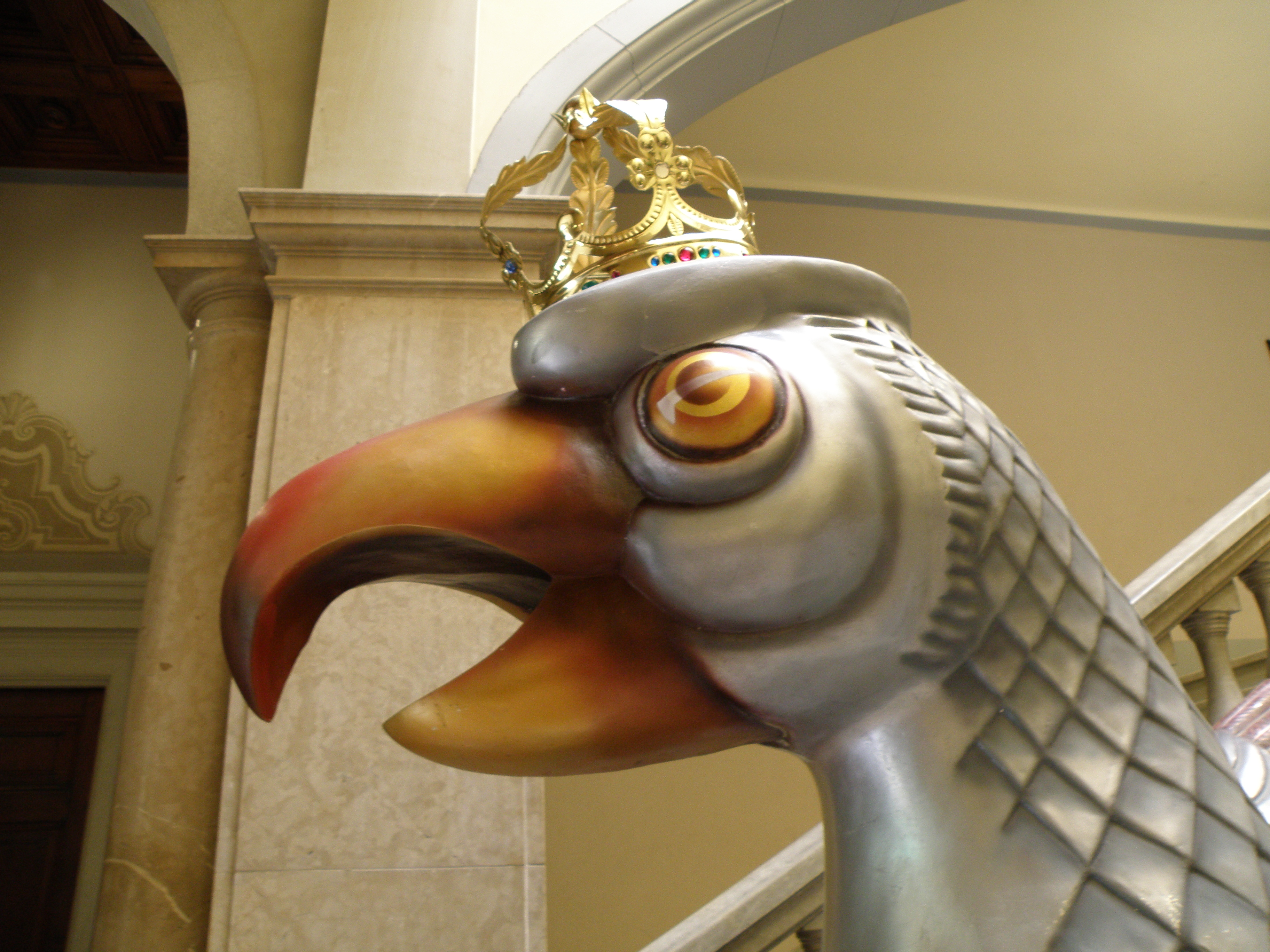 Àliga de les festes populars de Valls, Alt Camp, Tarragona.